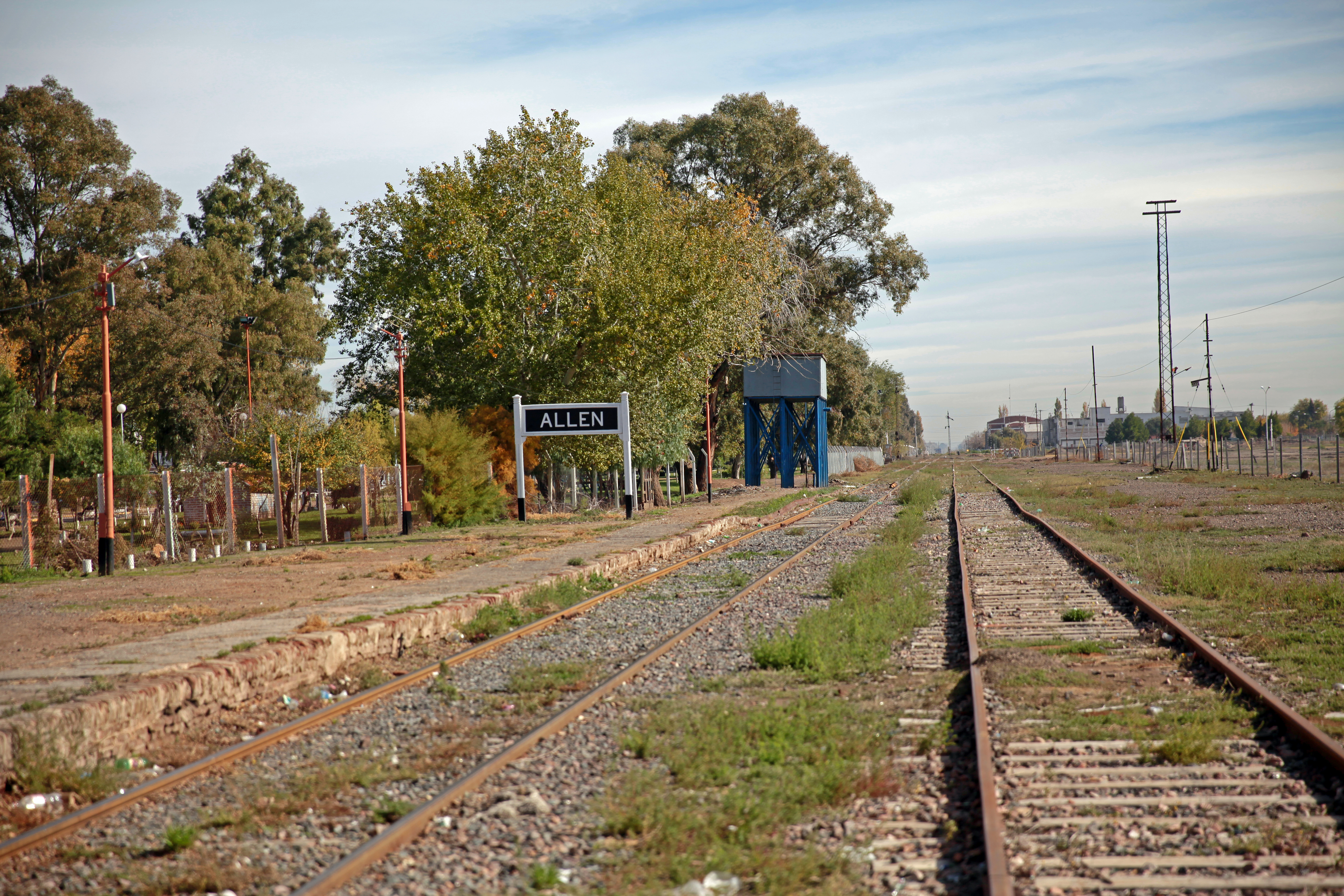 estacion tren - allen - nomenclador